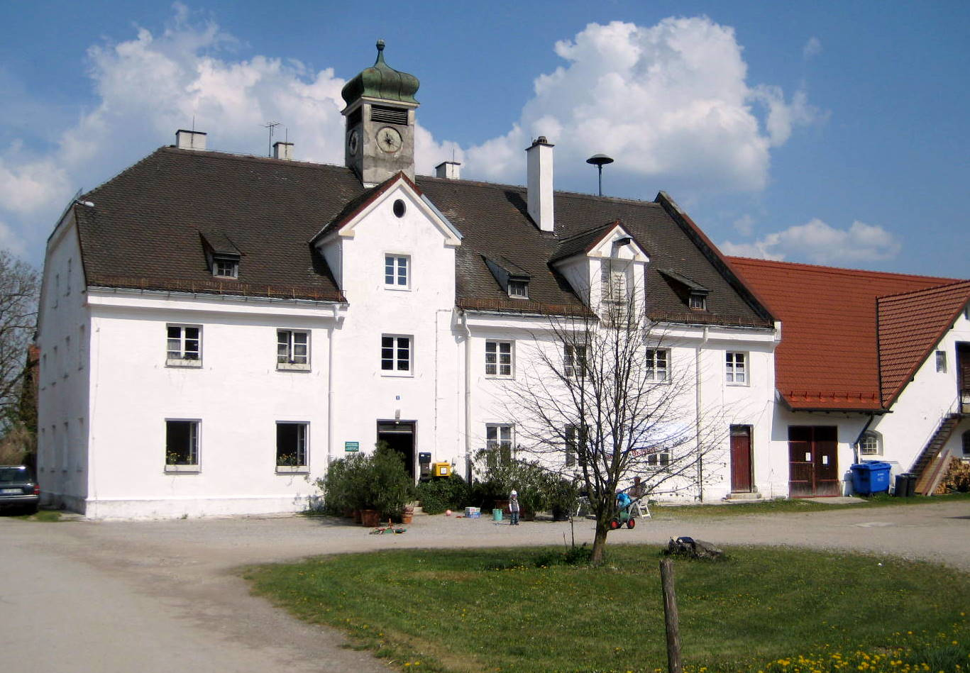 Das Gut Graßlfing gehört zum Wittelsbacher Ausgleichsfonds.